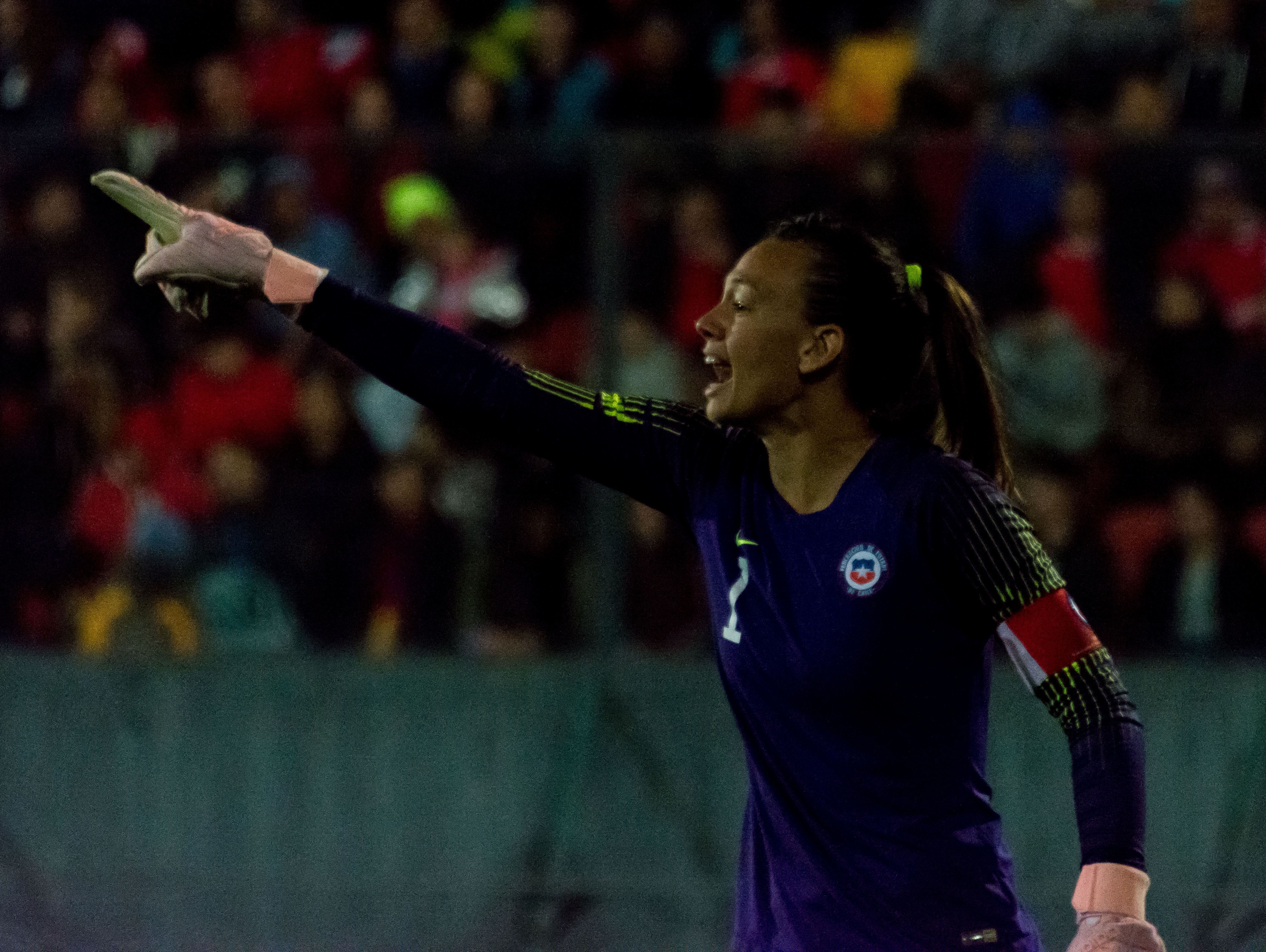 Christiane Endler, Chile v Sudáfrica, Estadio Santa Laura, Independencia, Santiago, Chile.